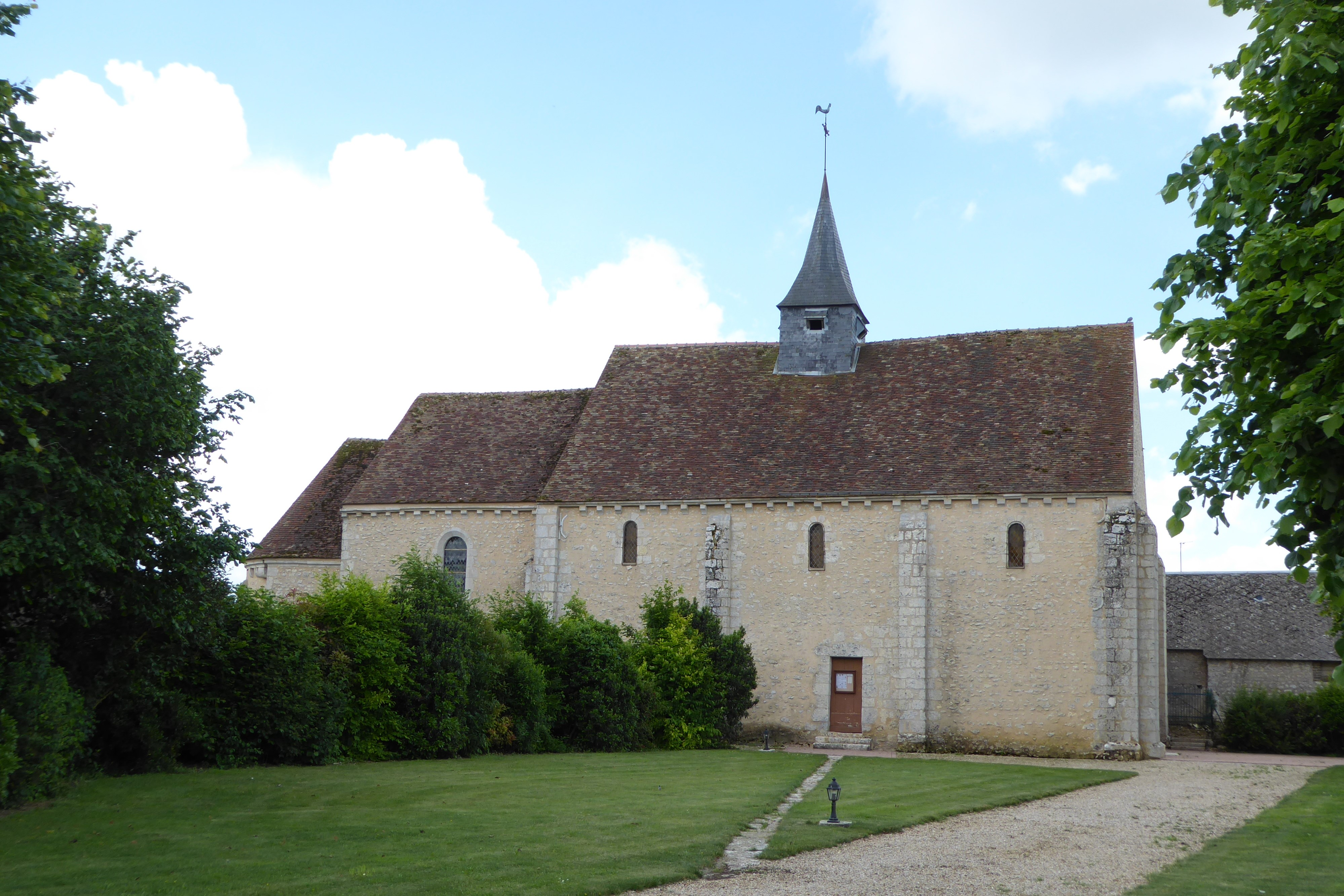 église Saint-Georges, Bullainville, Eure-et-Loir, France.